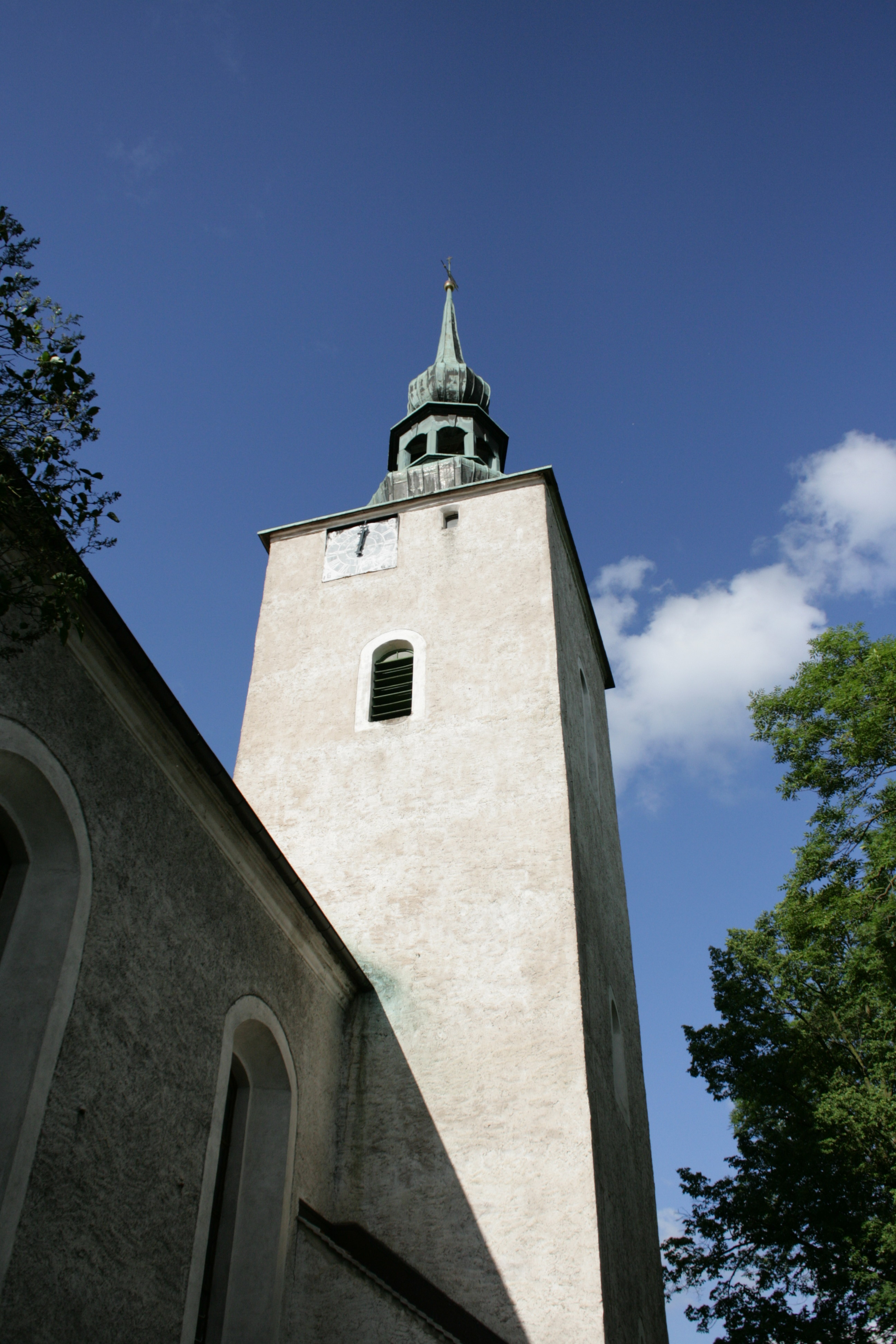 Wehrkirche, Görlitzer Straße in Horka